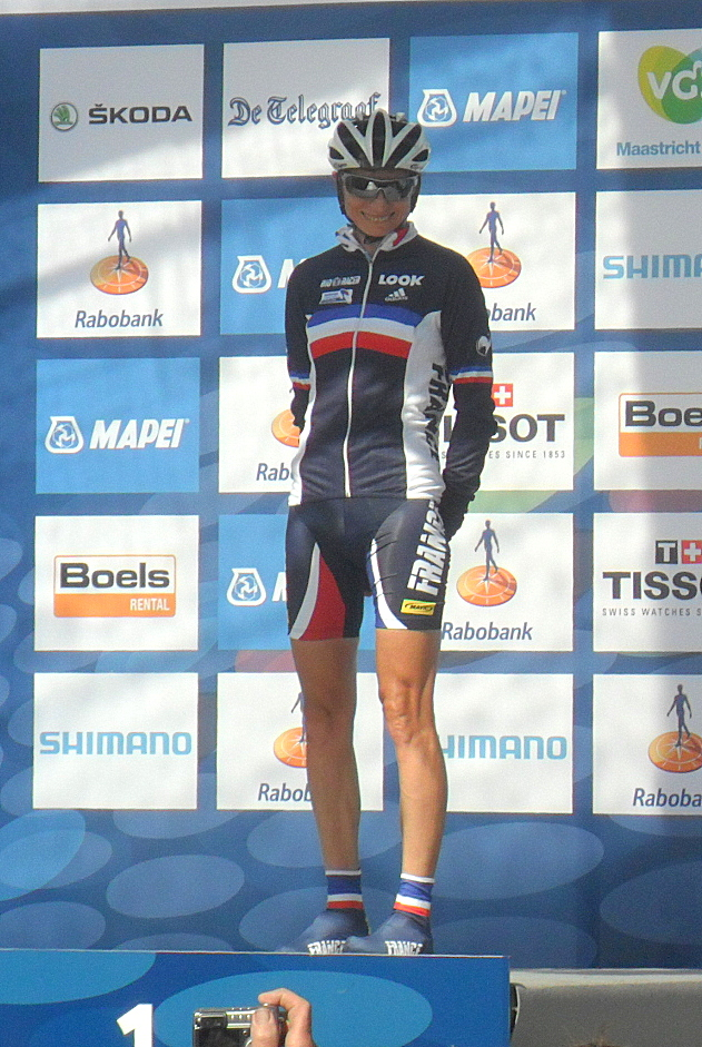 Edwige Pitel (Frankrijk) voor de start van het Wereldkampioenschap 2012 in Valkenburg, Nederland.